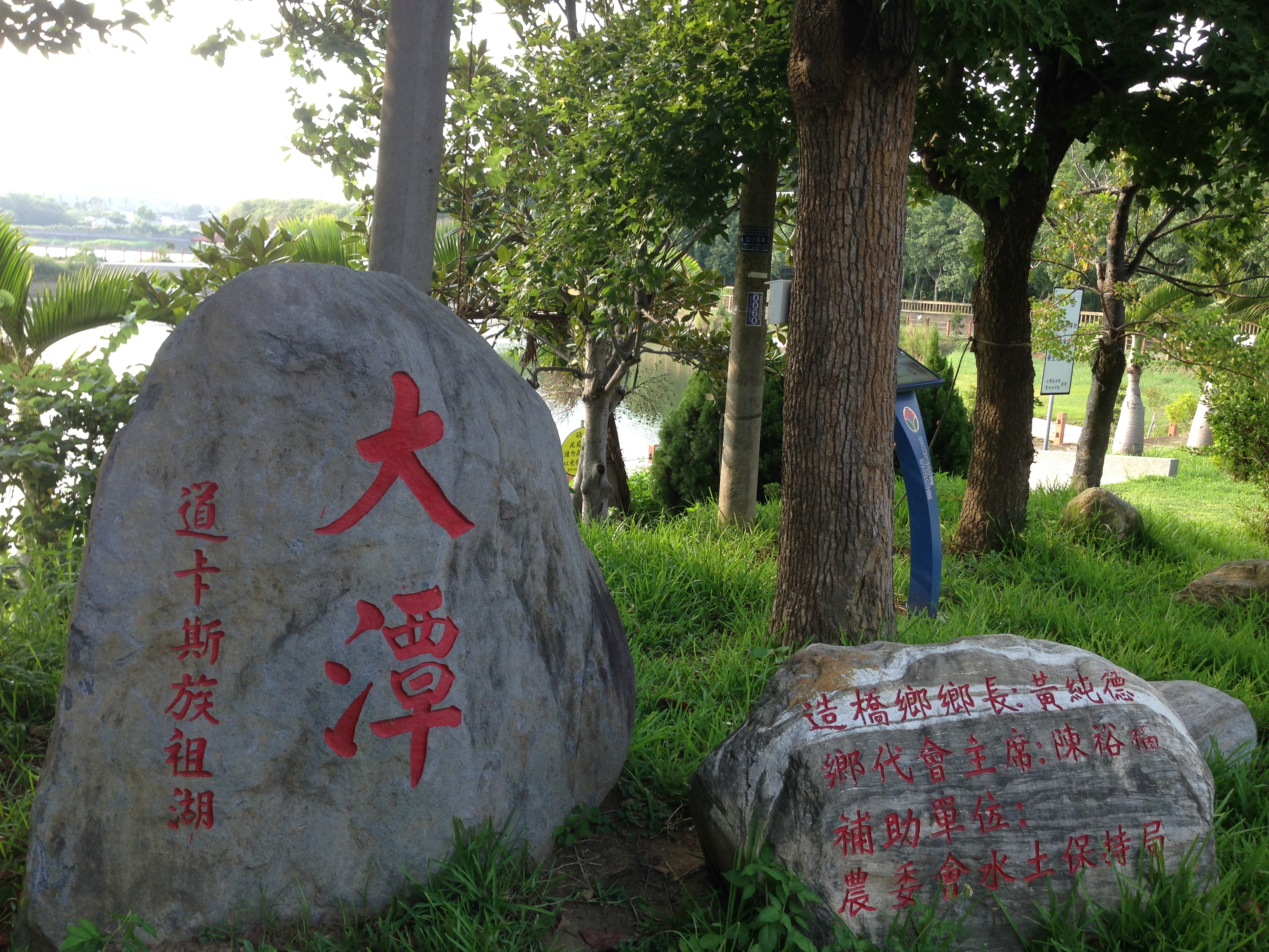 苗栗縣造橋鄉龍昇湖畔